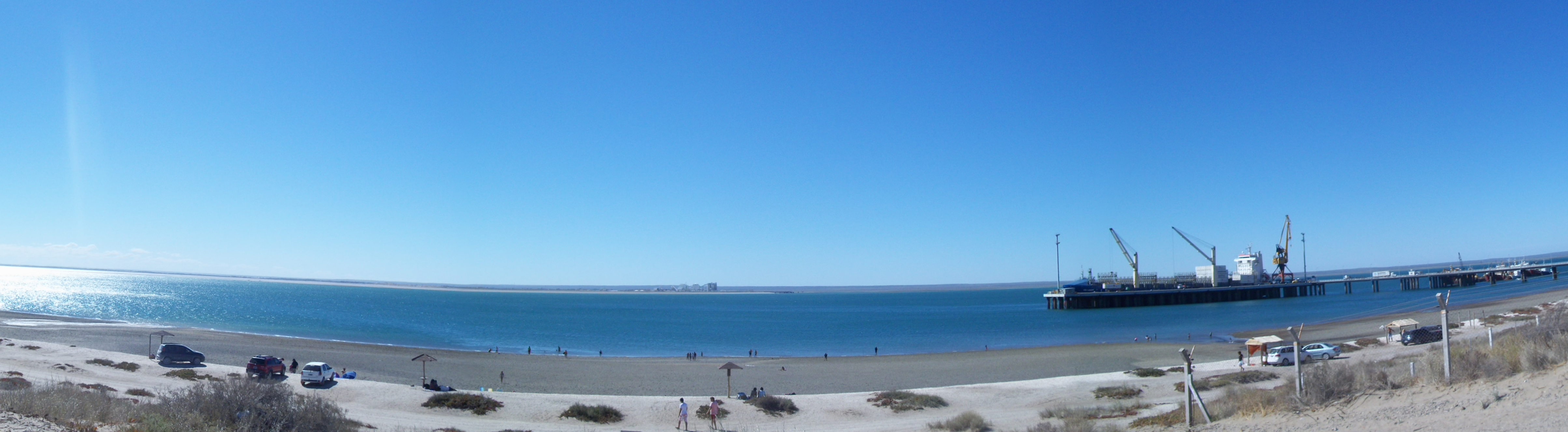 Las playas y el puerto de la localidad de San Antonio Este, en la provincia de Río Negro, Argentina